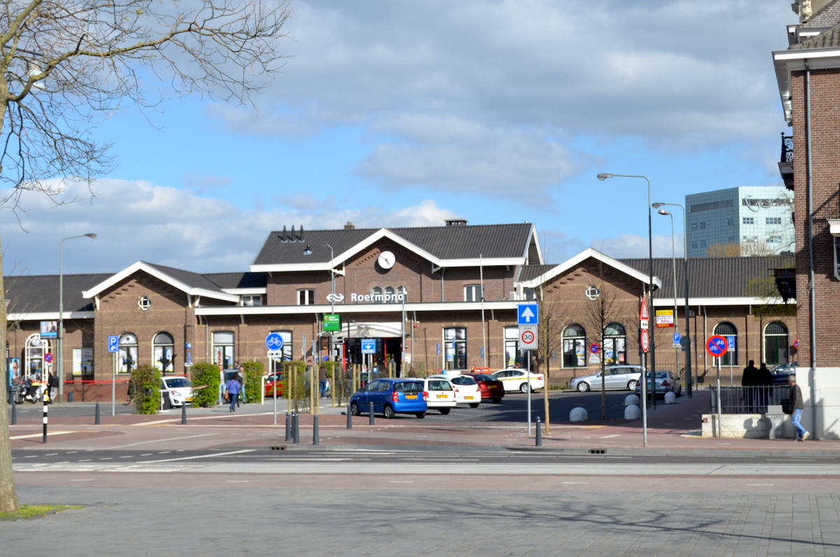 Stationsplein Roermond; 17 april 2015. Foto: Erik Swierstra.